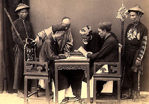 Trí thức và thông dịch viên làm việc cho quan Khâm sứ Hà Nội